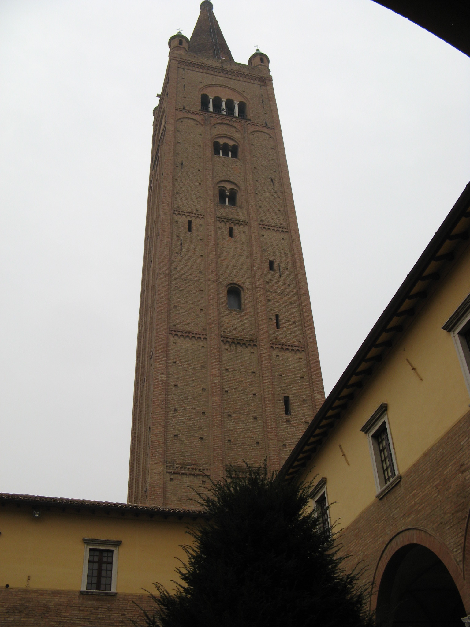 Forlì: campanile dell'Abbazia di San Mercuriale